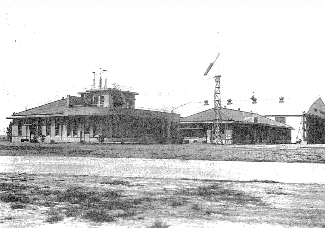 中文（台灣）: 台北飛行場內的台北飛行場事務所及日本航空輸送會社事務所